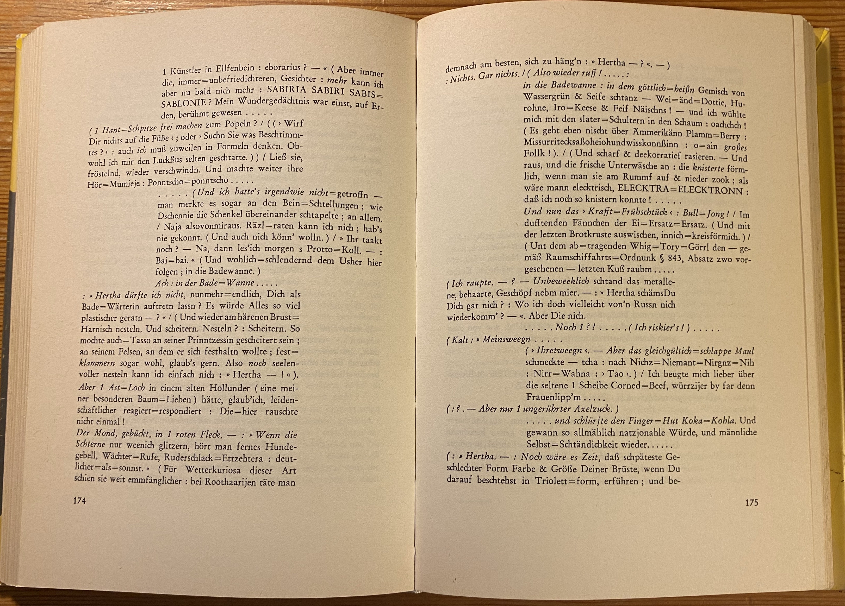 Doppelseite aus dem Faksimilie der Erstausgabe von Arno Schmidts Roman "Kaff auch Mare Crisium"